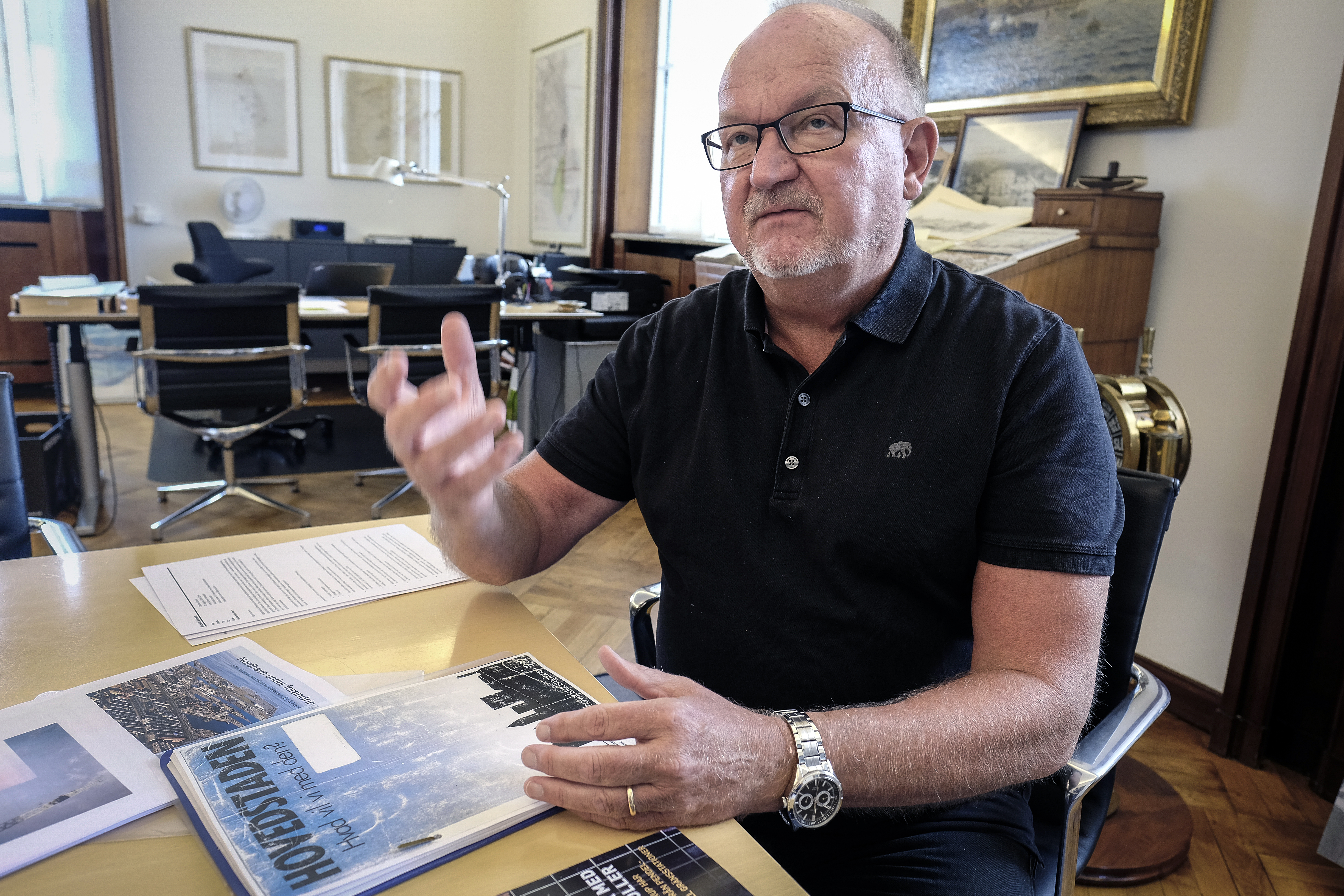 Jens Kramer Mikkelsen, adm. direktÃ¸r i Udviklingsselskabet By & Havn I/S som Ã¤ger och utvecklar markomrÃ¥dena Ãrestad, KÃ¸benhavns Havn och Nordhavnen till nya bostads och kontorsomrÃ¥den samt Ã¤r hÃ¤lftenÃ¤gare i KÃ¶penhamns och MalmÃ¶s gemensamma hamnbolag Copenhagen MalmÃ¶ Port, CMP CM. Jens Kramer Mikkelsen har tidigare varit overborgmester i KÃ¸benhavn Photo: News Ãresund - Johan Wessman Â© News Ãresund - Johan Wessman (CC BY 3.0) Detta verk av News Ãresund Ã¤r licensierat under en Creative Commons ErkÃ¤nnande 3.0 Unported-licens (CC BY 3.0). Bilden fÃ¥r fritt publiceras under fÃ¶rutsÃ¤ttning att kÃ¤lla anges. The picture can be used freely under the prerequisite that the source is given. News Ãresund, MalmÃ¶, Sweden. News Ãresund Ã¤r en oberoende regional nyhetsbyrÃ¥ som Ã¤r en del av det oberoende dansk-svenska kunskapscentrat Ãresundsinstituttet.